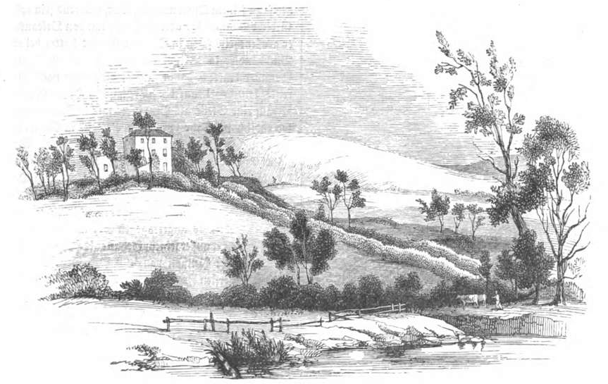 Southey's Haus, Gretahof. (Greta Hall)